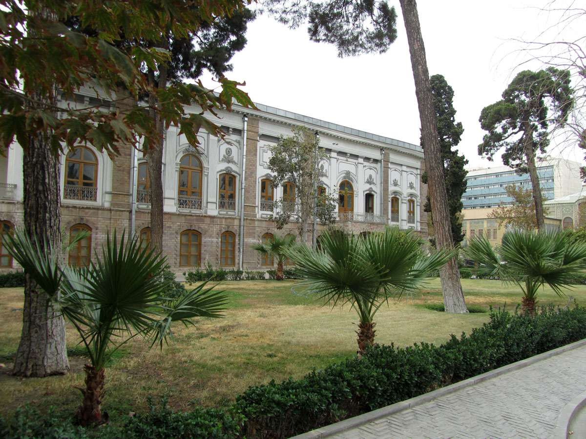 Abyaz Palace at Golestan Garden Palace, Tehran ,Iran